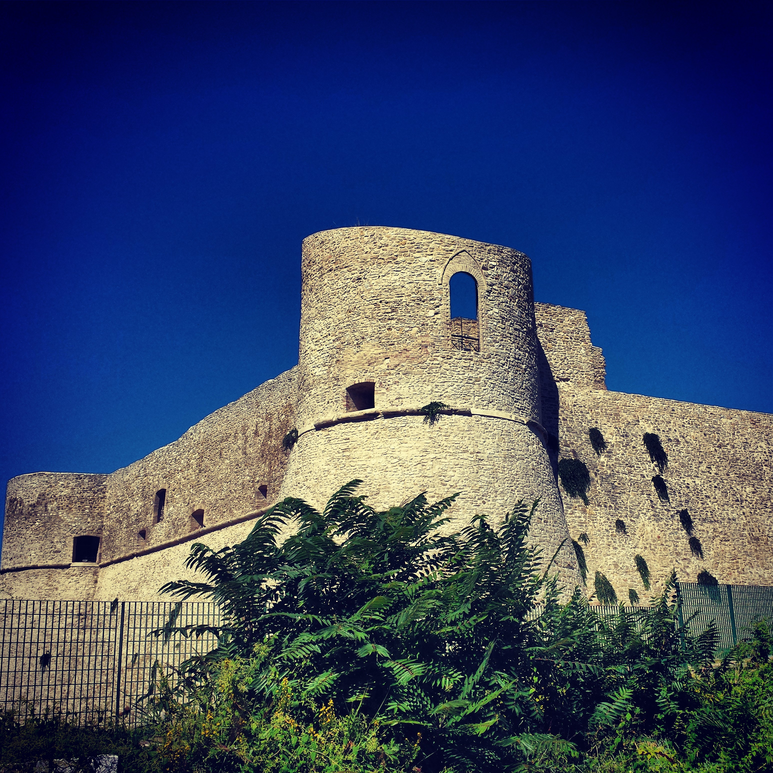 Esterni del Castello Aragonese. Ortona (CH) 2013